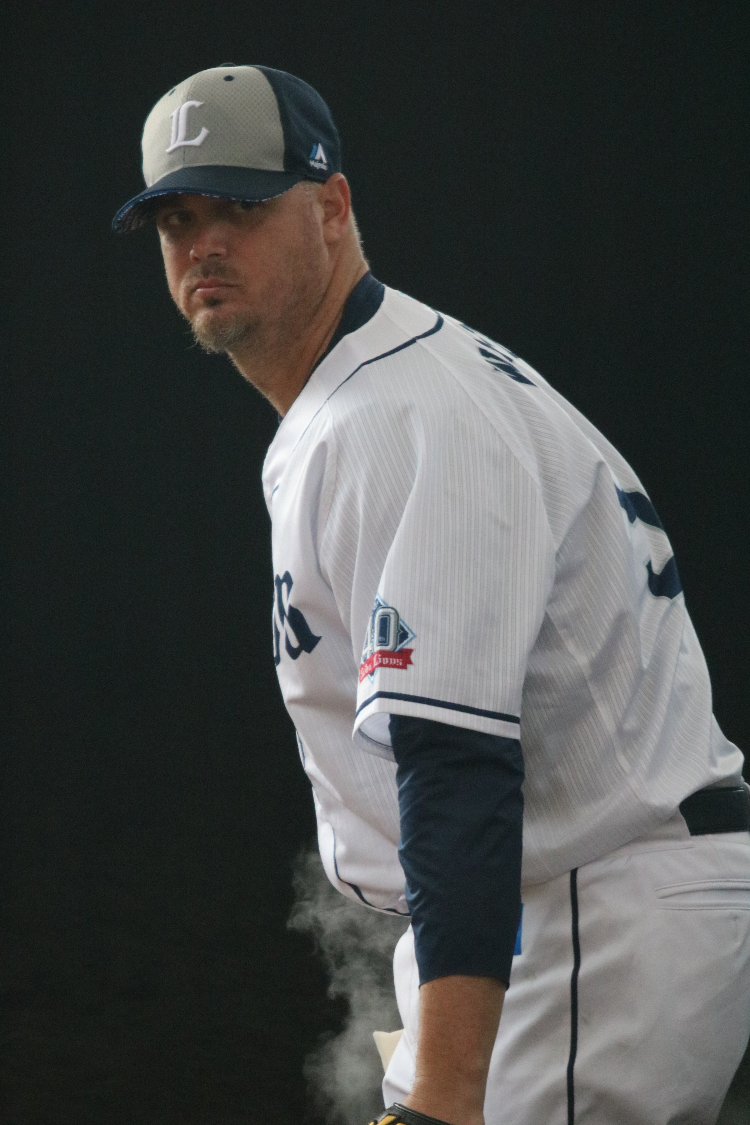 2018年2月9日